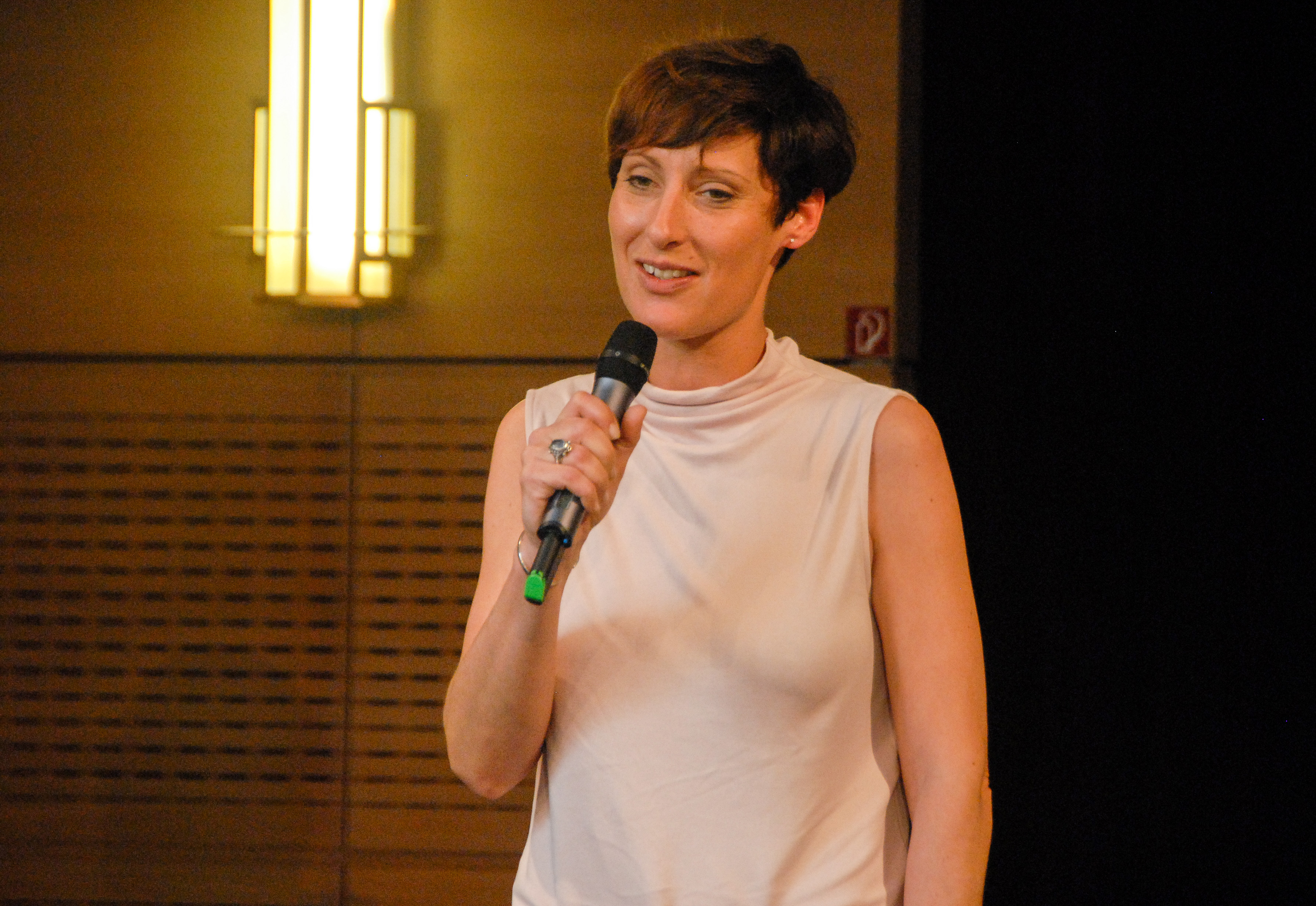 Dorotty Szalma beim Abschluss des 3LänderSpiels 2016 im Gerhart-Hauptmann-Theater Zittau.